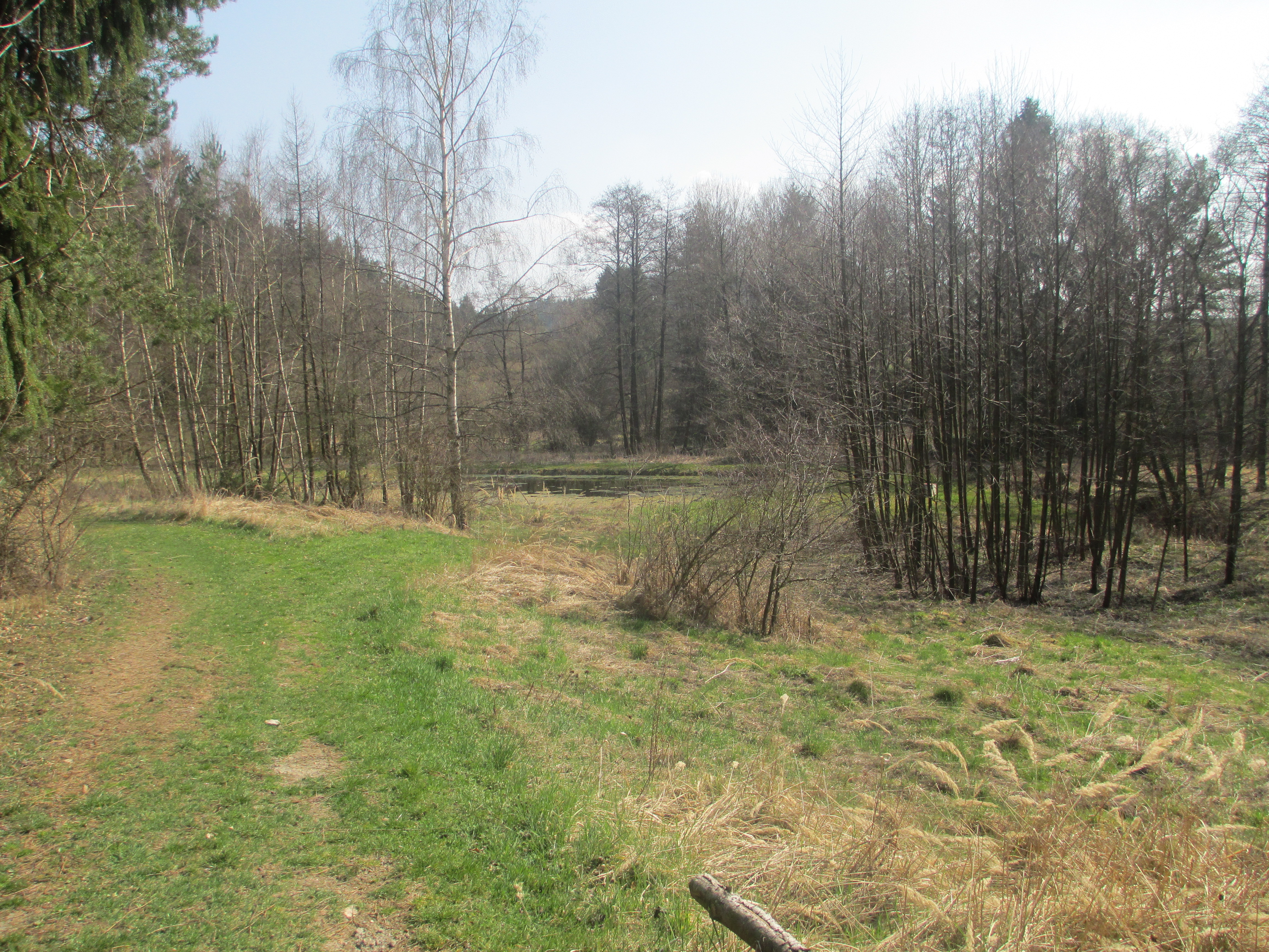 Chráněné území